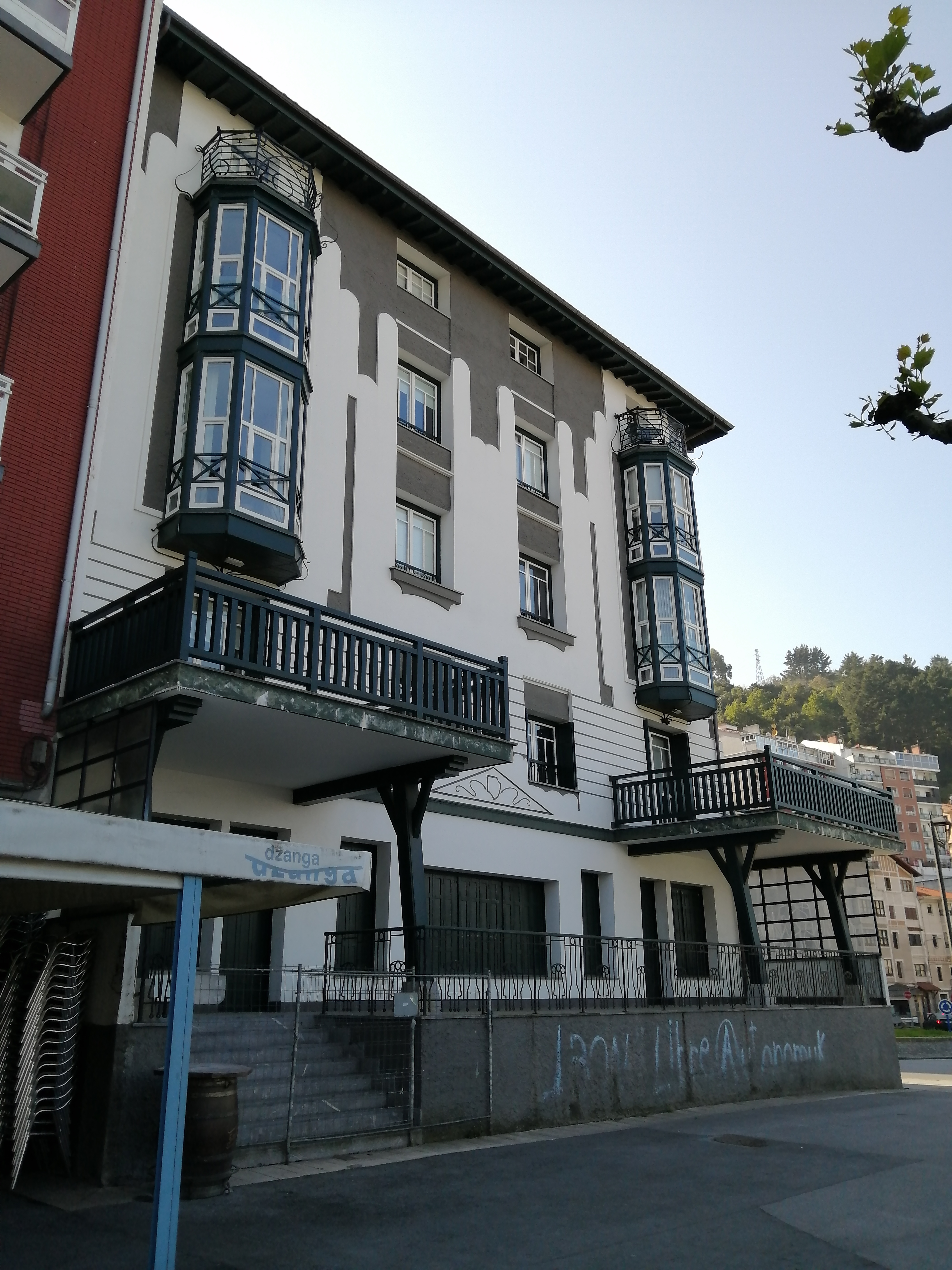 Ondarroako XX. mende hasierako hotela. Hotel de la bahía, Hotel Vega